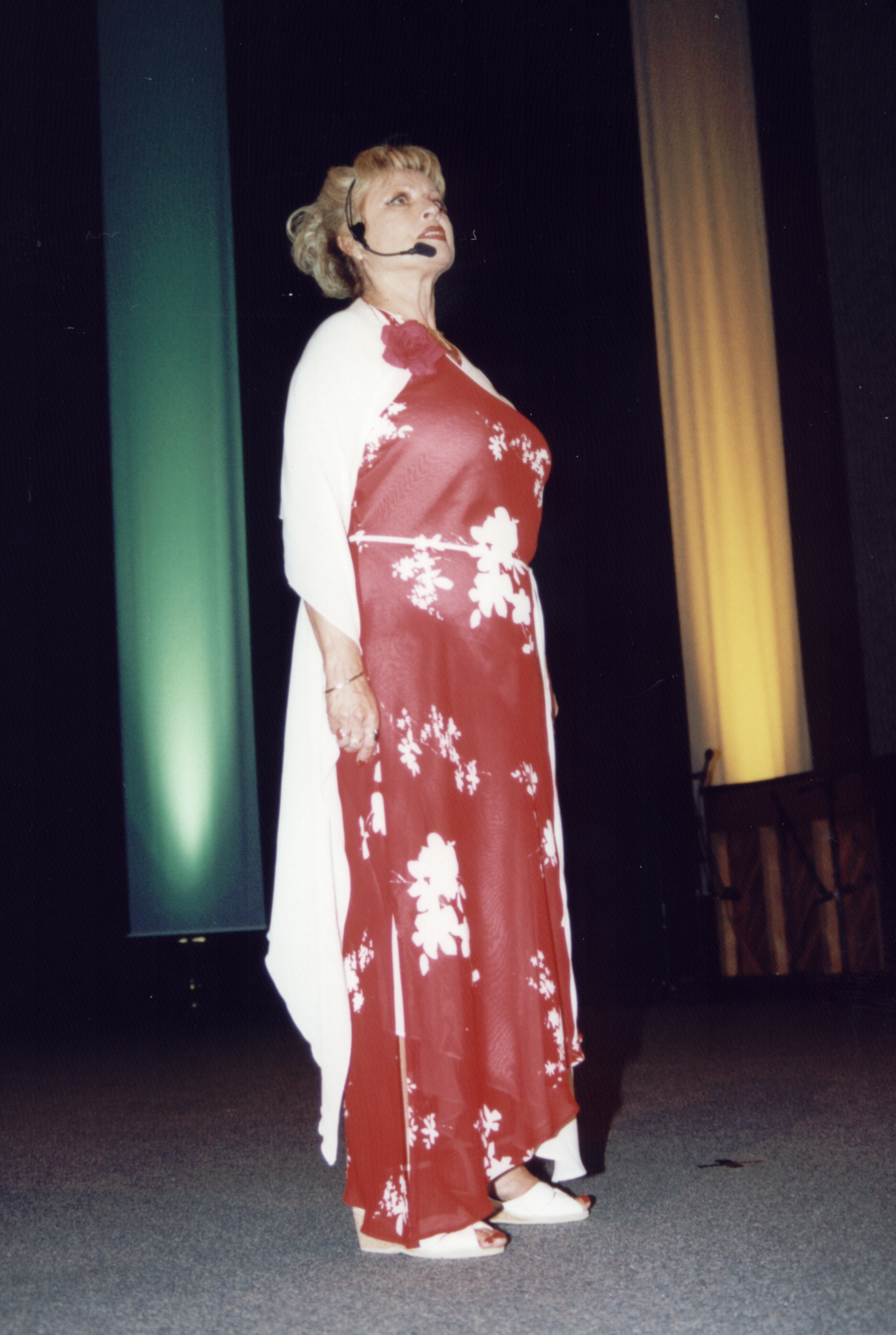 Universala Kongreso de Esperanto, Gotenburgo 2003. Vida Jerman.